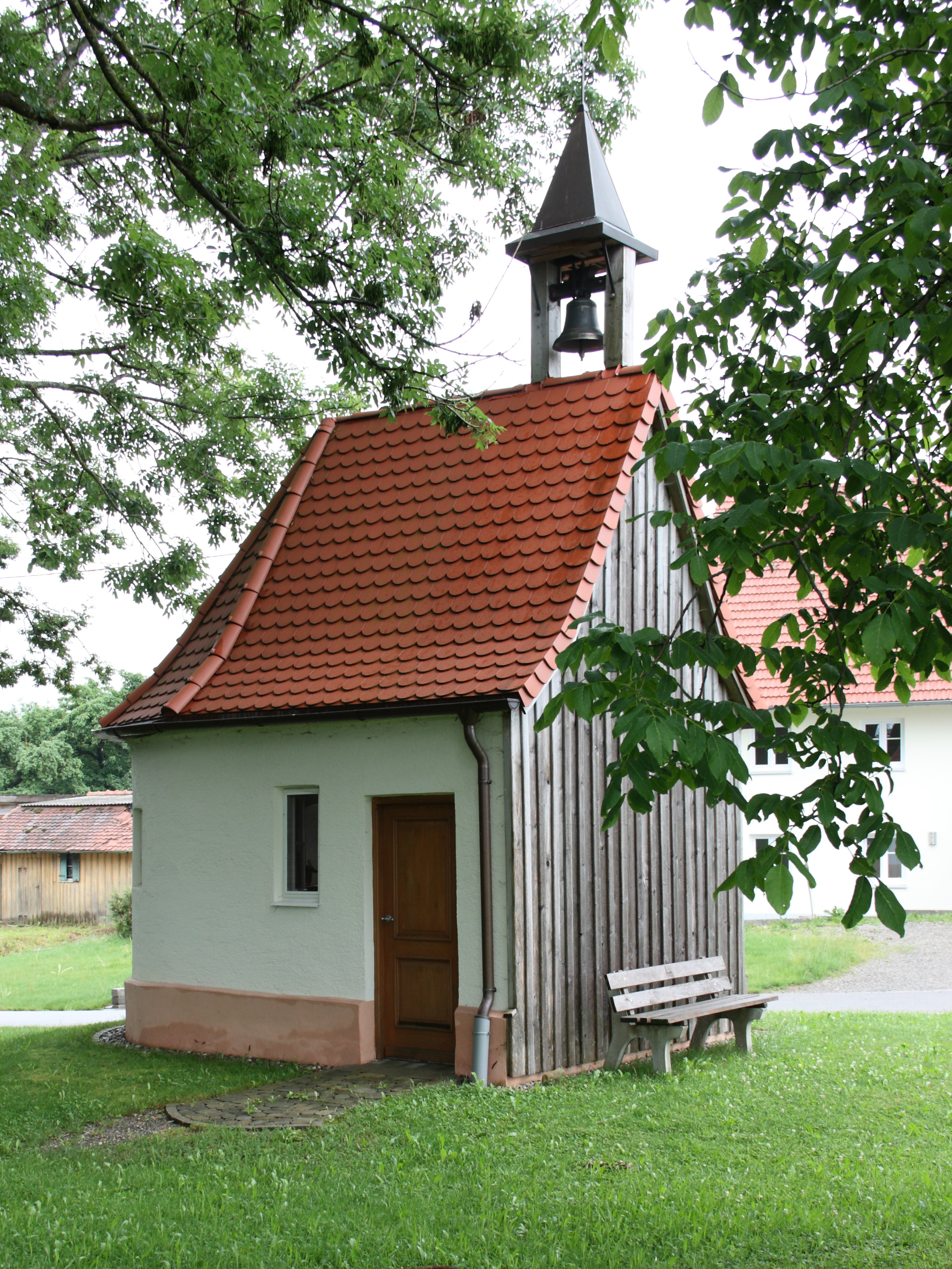 Kapelle von Nordwesten